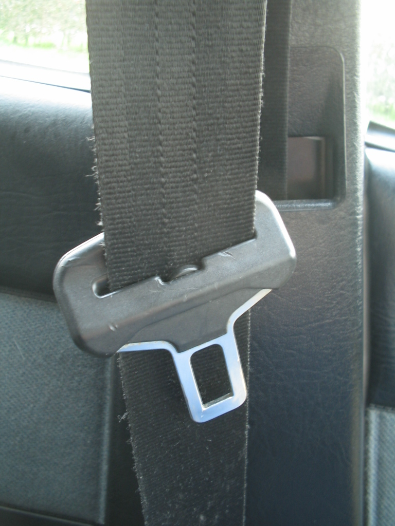 seat belt